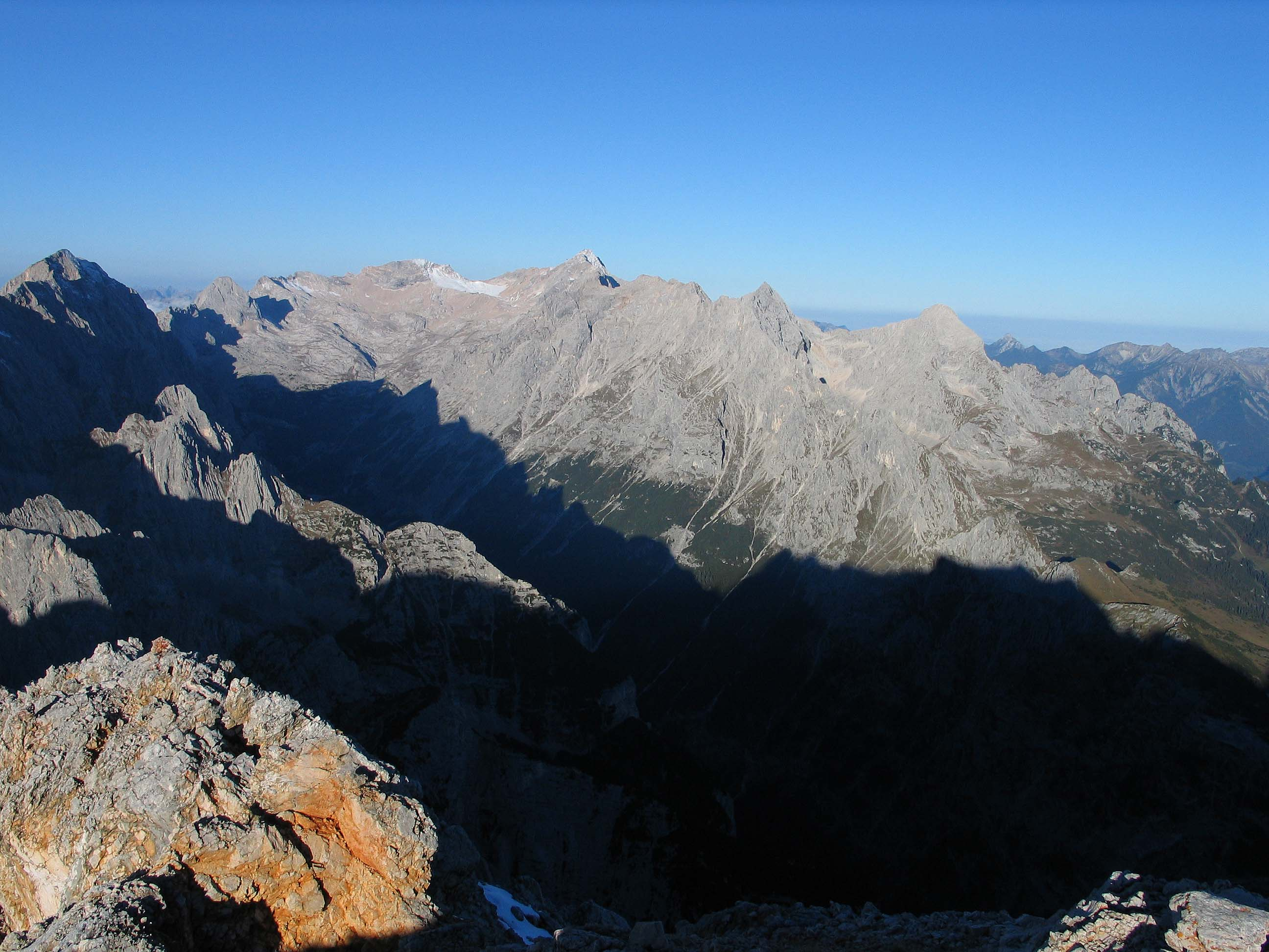 Blick von der Partenkirchener Dreitorspitze auf die Zugspitze, Wetterstein Photograph: Luidger (15. Oktober 2006)